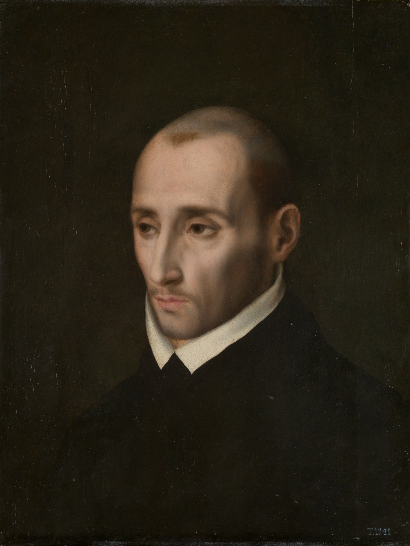 Retrato de San Juan de Ribera (1532-1611), que fue patriarca latino de Antioquía, arzobispo y virrey de Valencia y obispo de Badajoz.